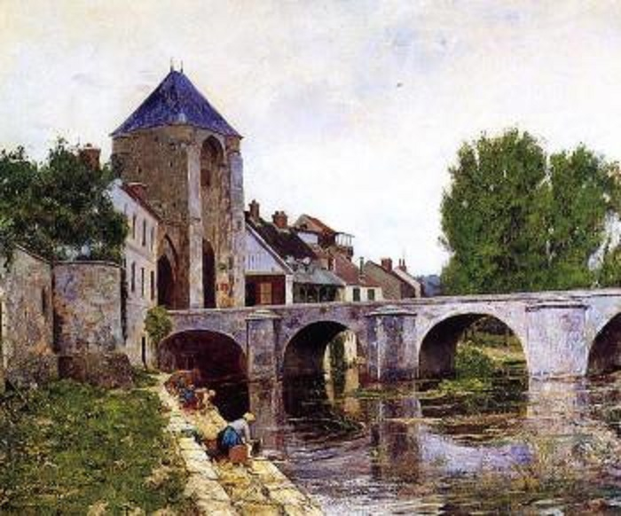 William Lamb Picknell : Jour gris, Moret (huile sur toile, vers 1895, collection privée)